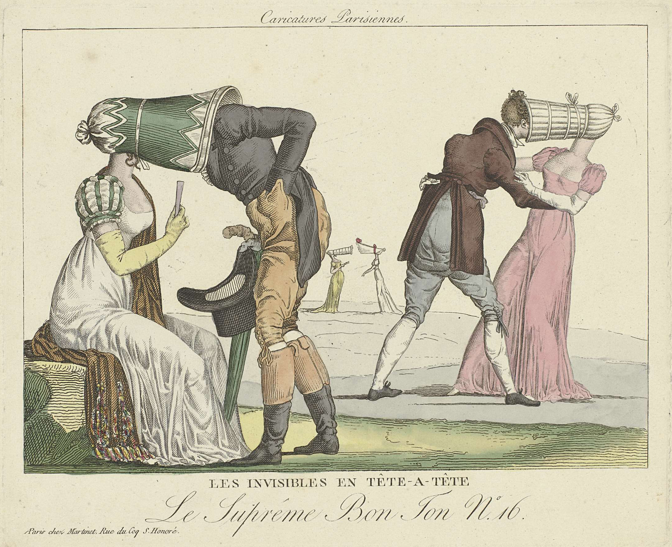 Le Suprême Bon Ton. Caricature Parisienne No. 16.